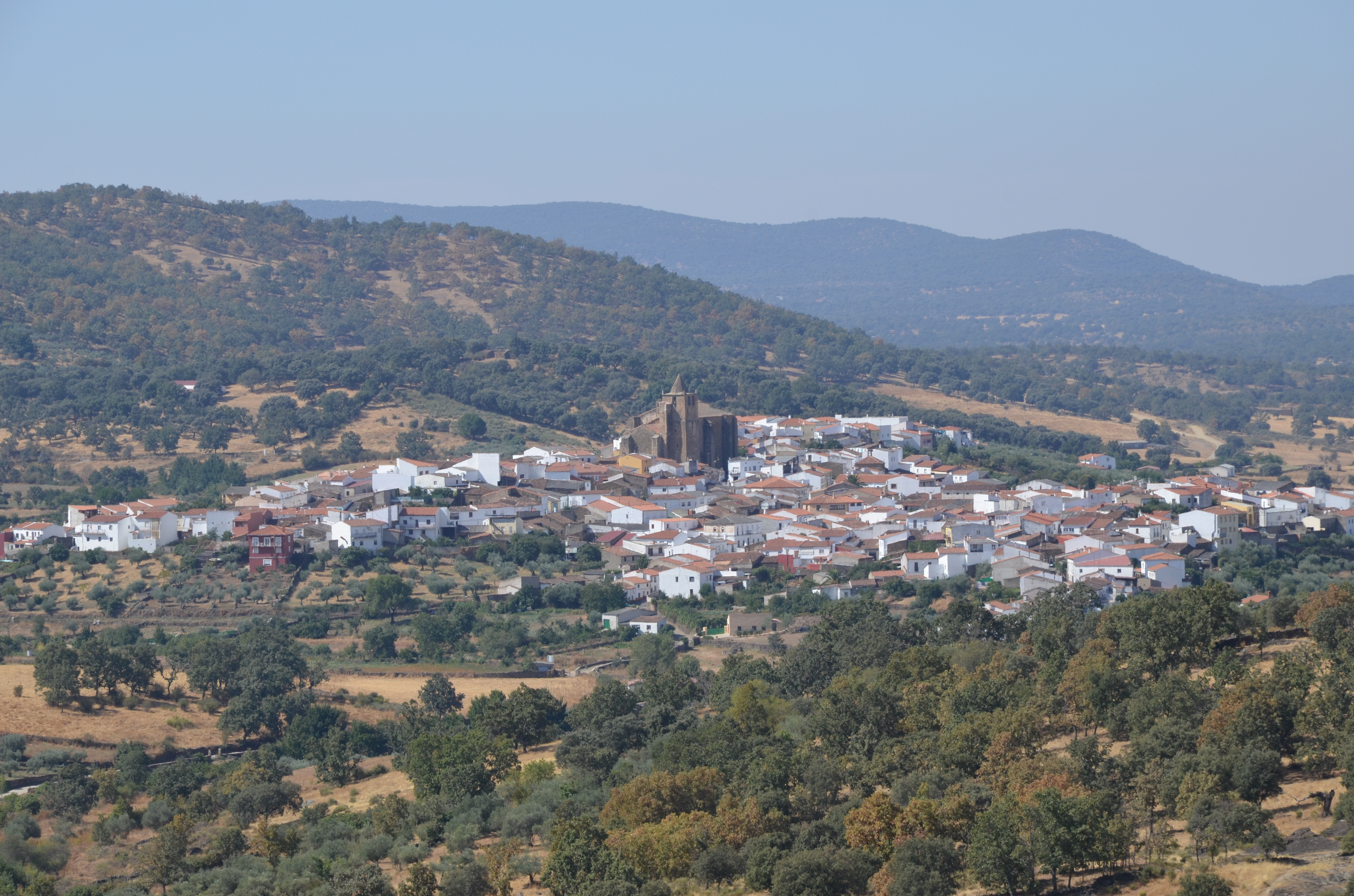 Iglesia Parroquial de Santiago